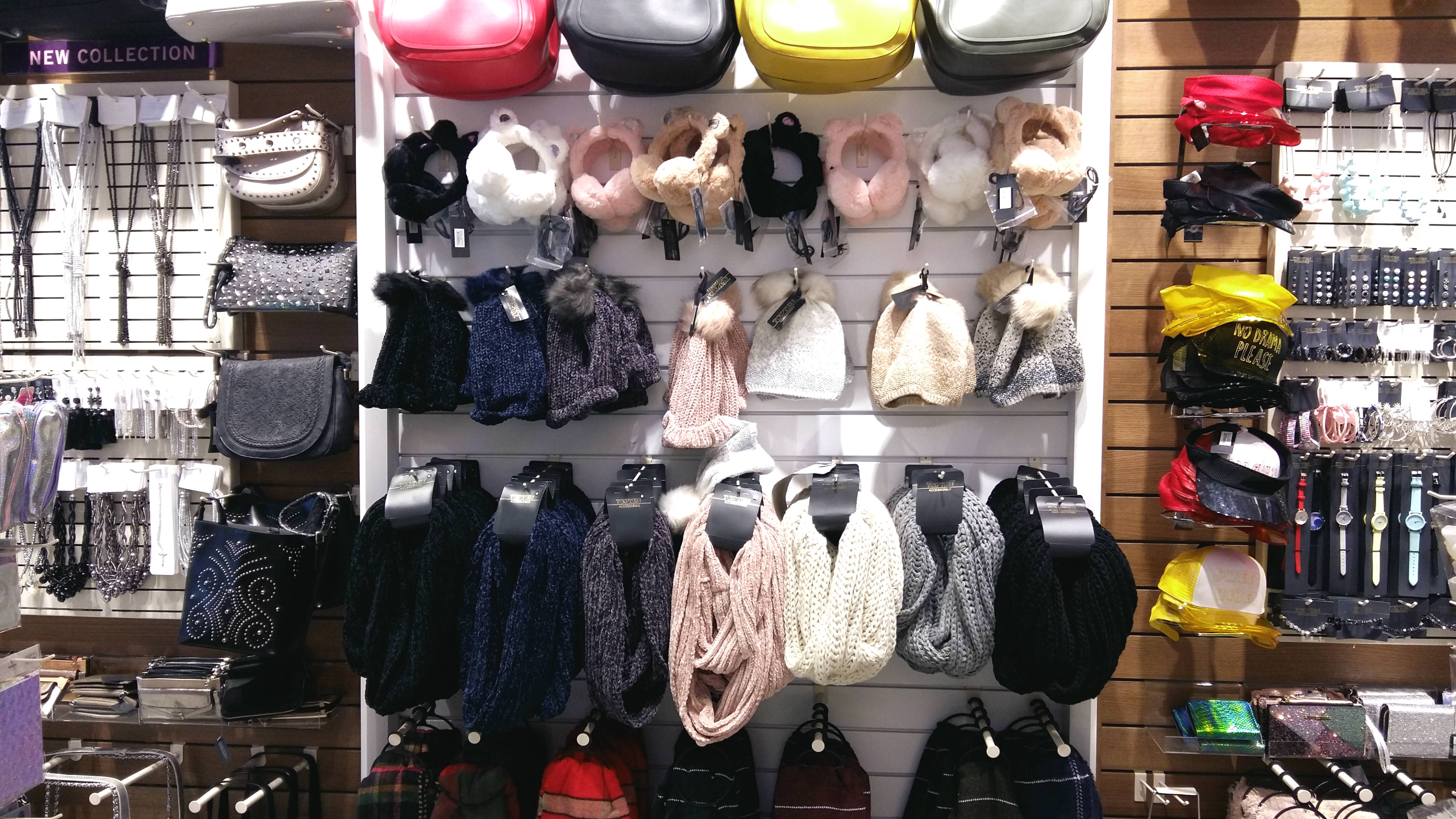 אביזרי אופנה בחנות